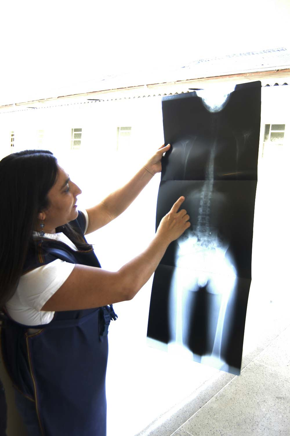 X-ray